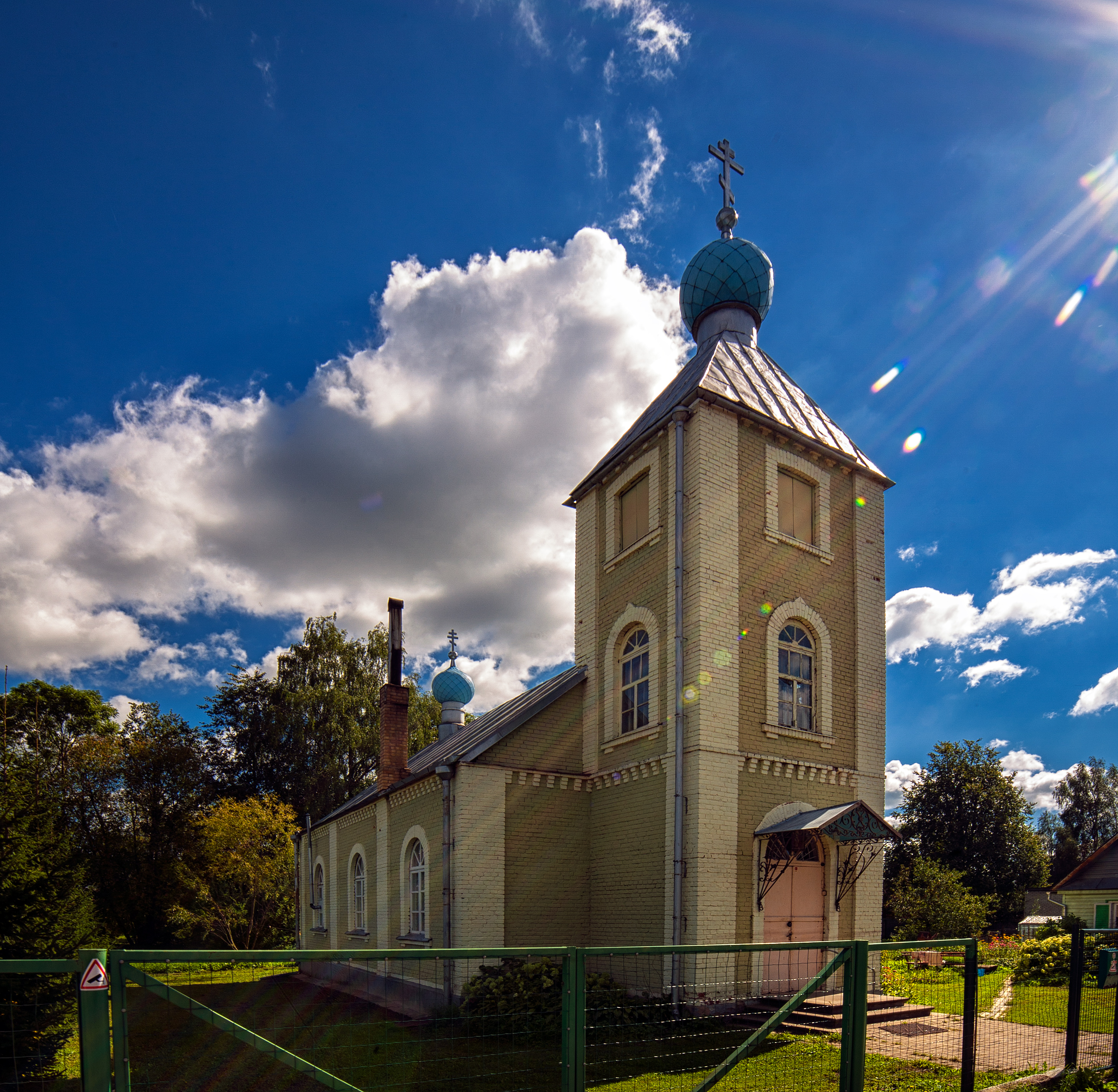 Judovkas-Maļutku Svētās Dievmātes Aizmigšanas un Nikolaja Brīnumdara lūgšanu nams